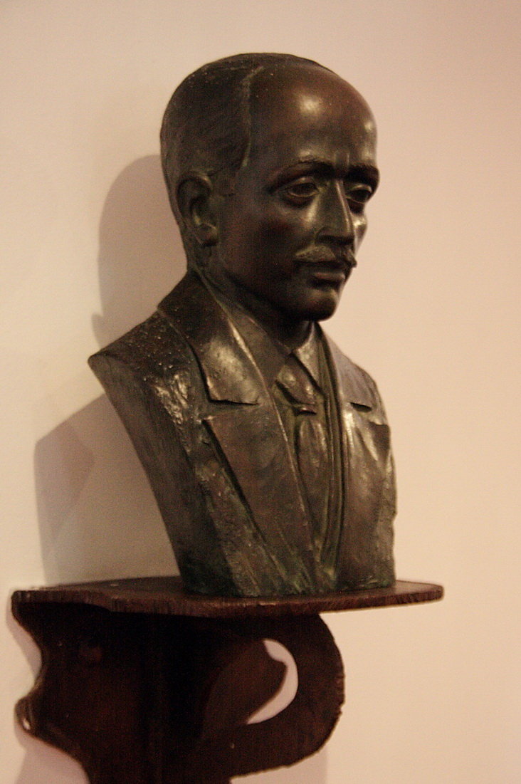 Bust de Josep Maria Jujol al Teatre Metropol a Tarragona.